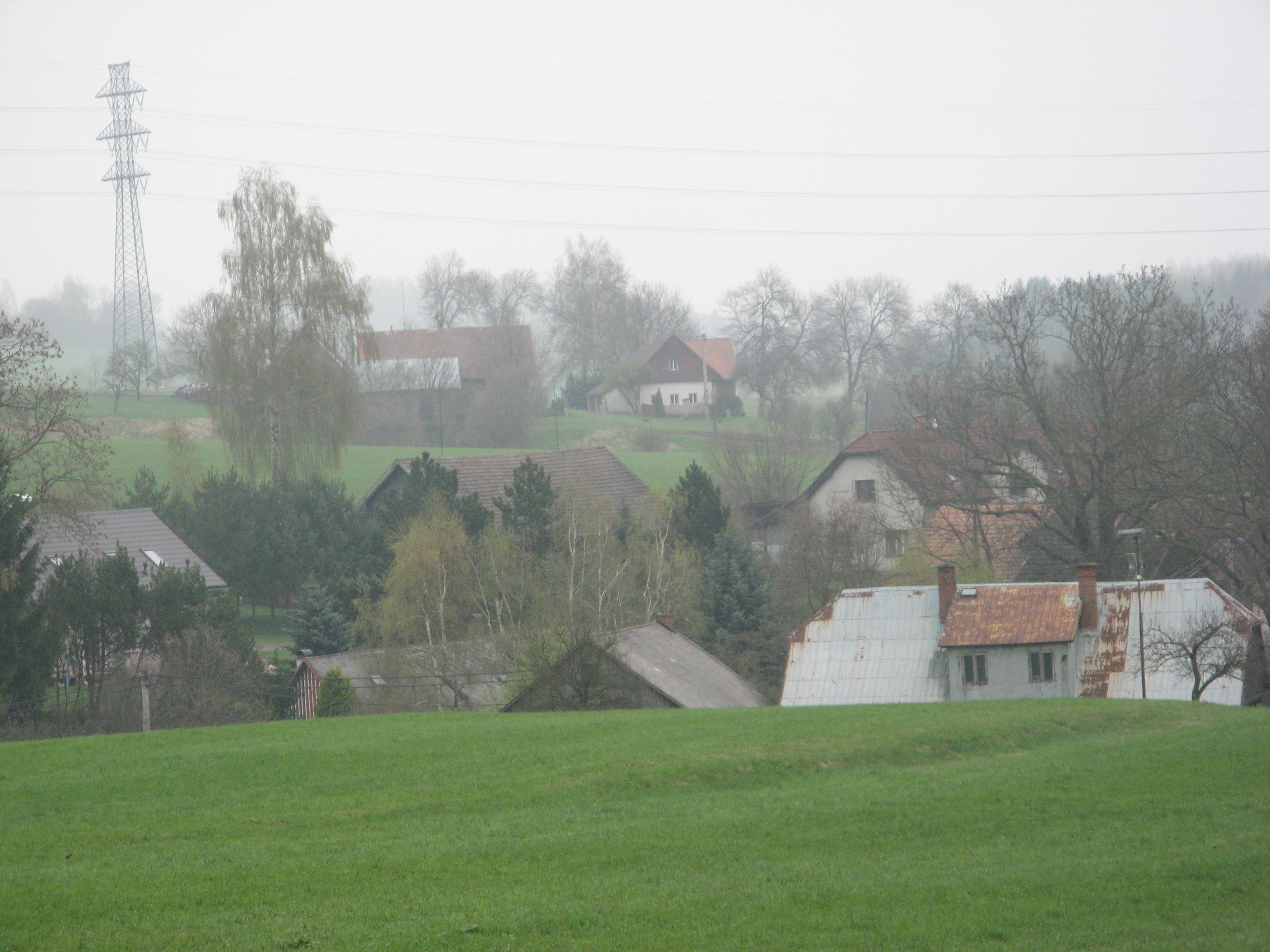 centrum obce